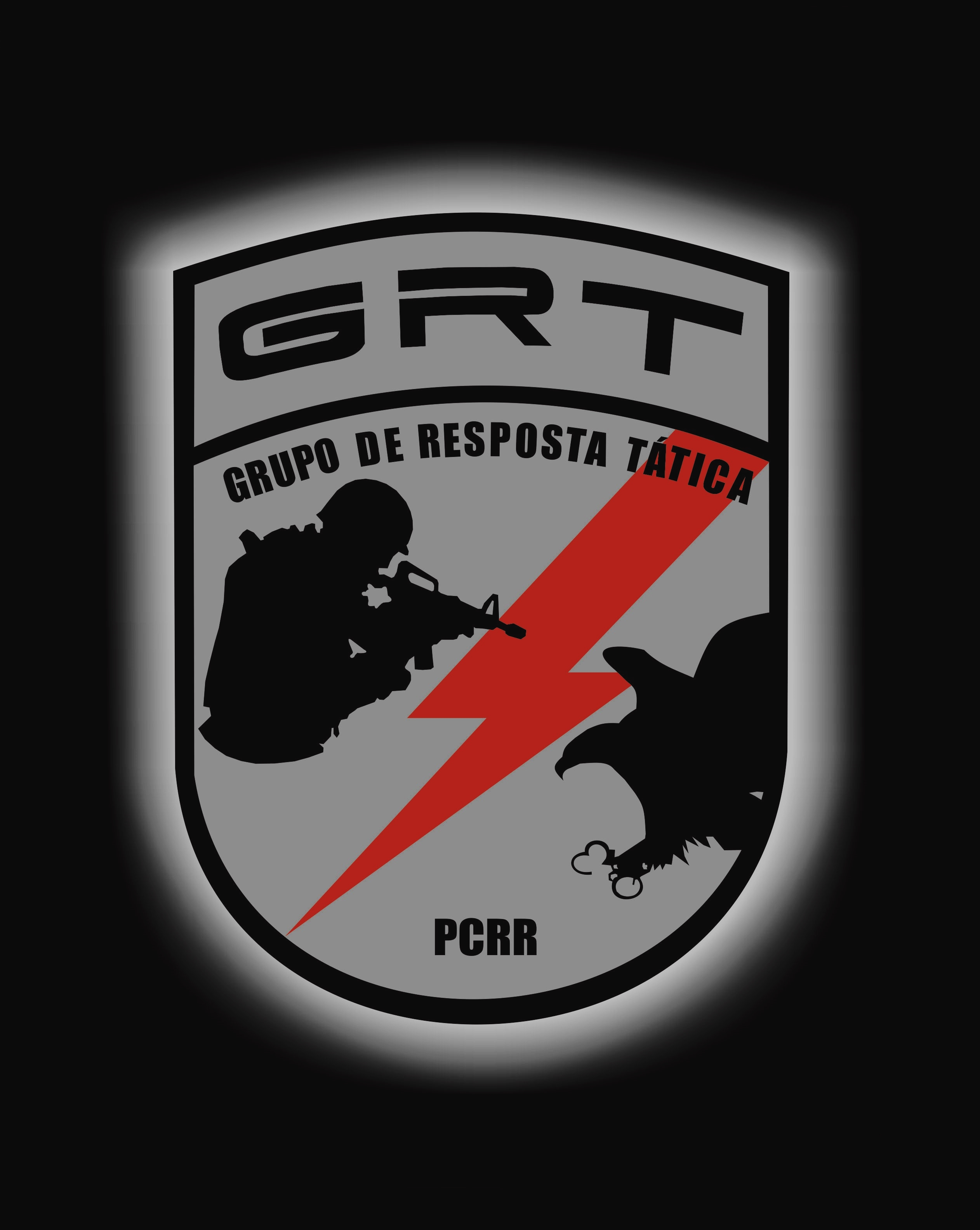 Grt